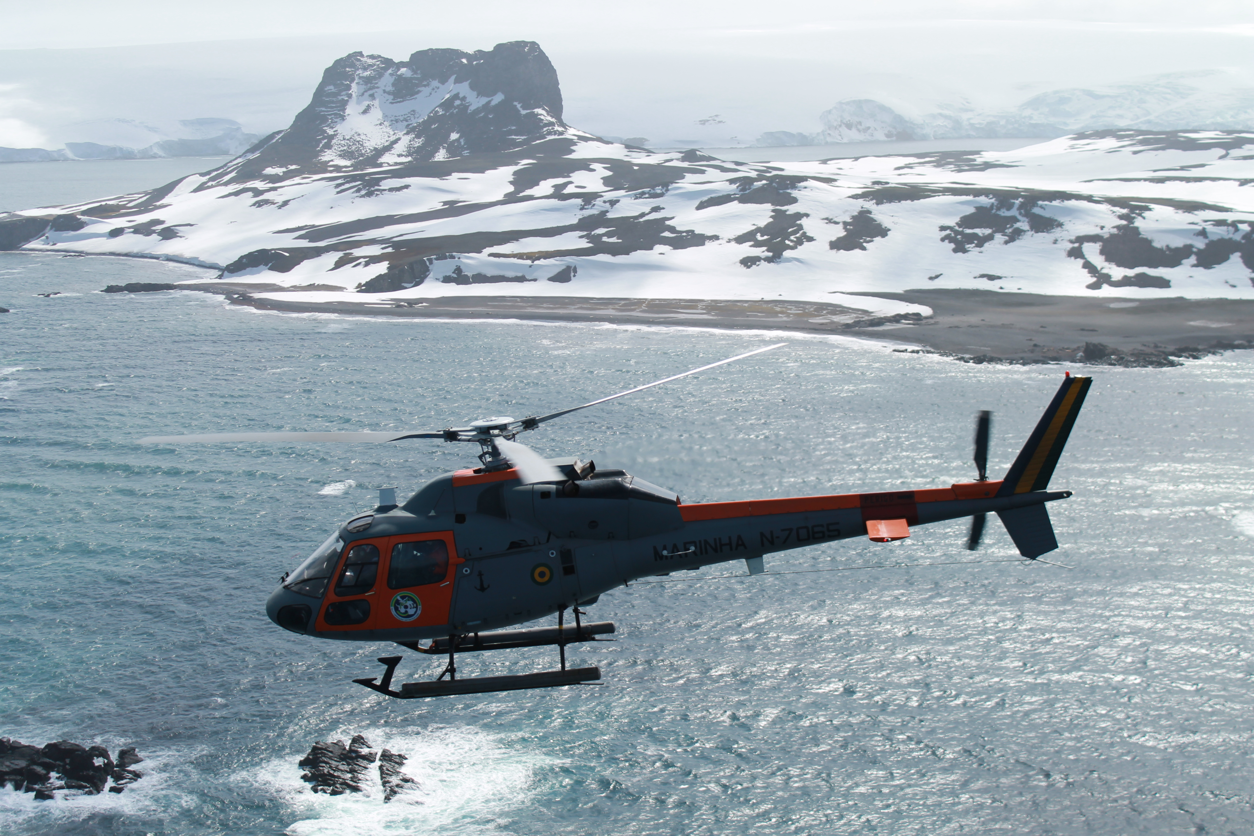 Arquivo liberado pela Marinha do Brasil através de projeto GLAM com Wiki Educação Brasil